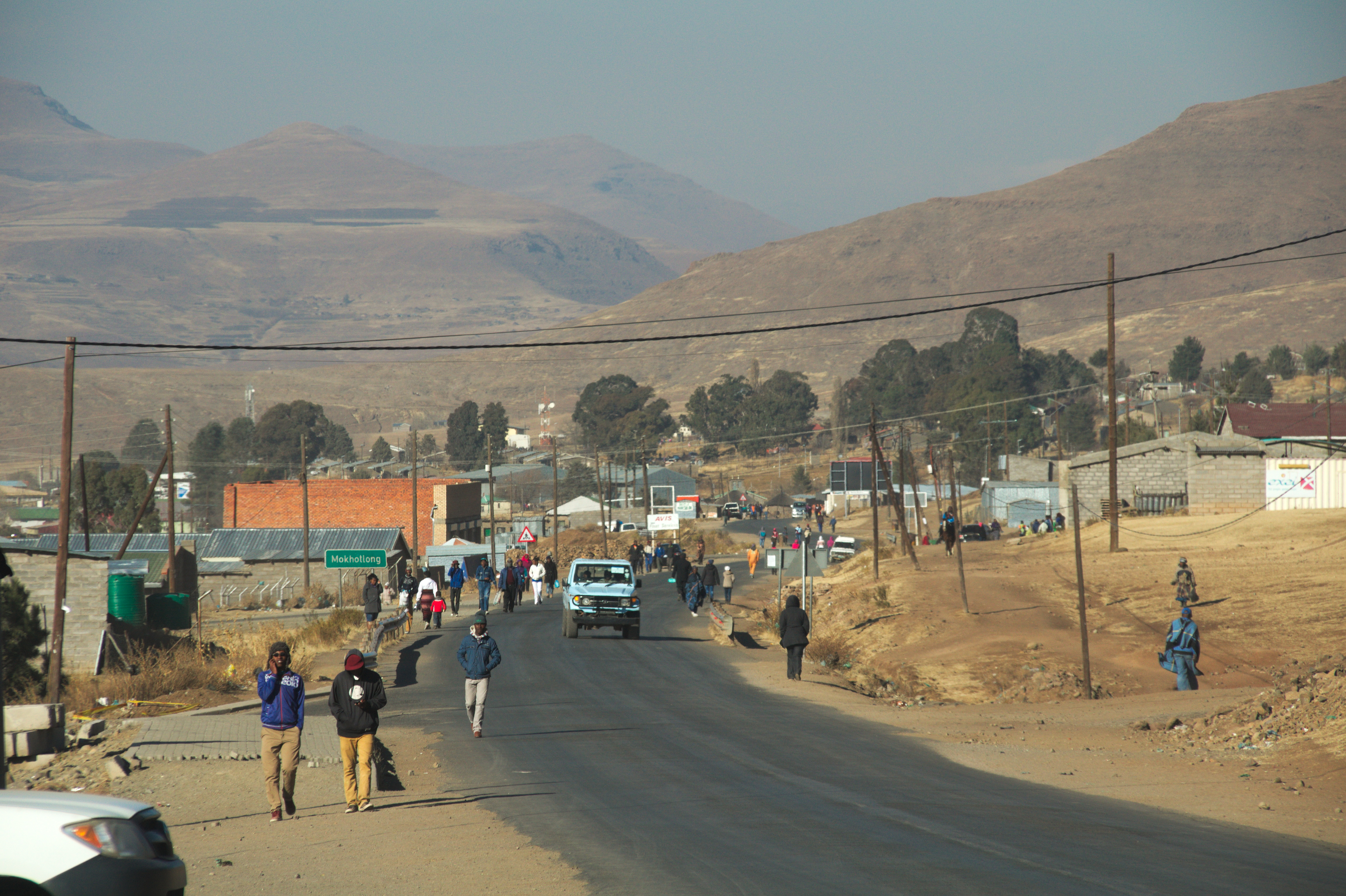 Mokhotlong vu depuis l'entrée en descendant du col de Sani. Lesotho, 2014.